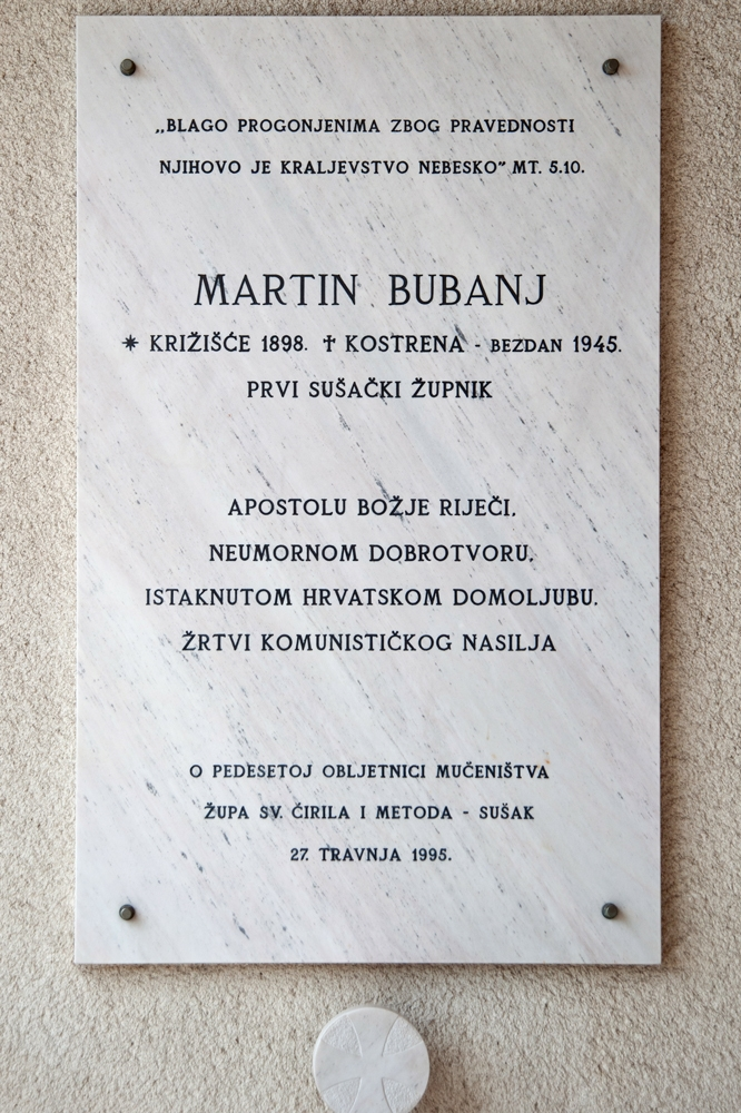 Spomen-ploča Martinu Bubnju u predvorju crkve Presvetog Srca Isusova časnih sestara sv. Križa na Sušaku u Rijeci